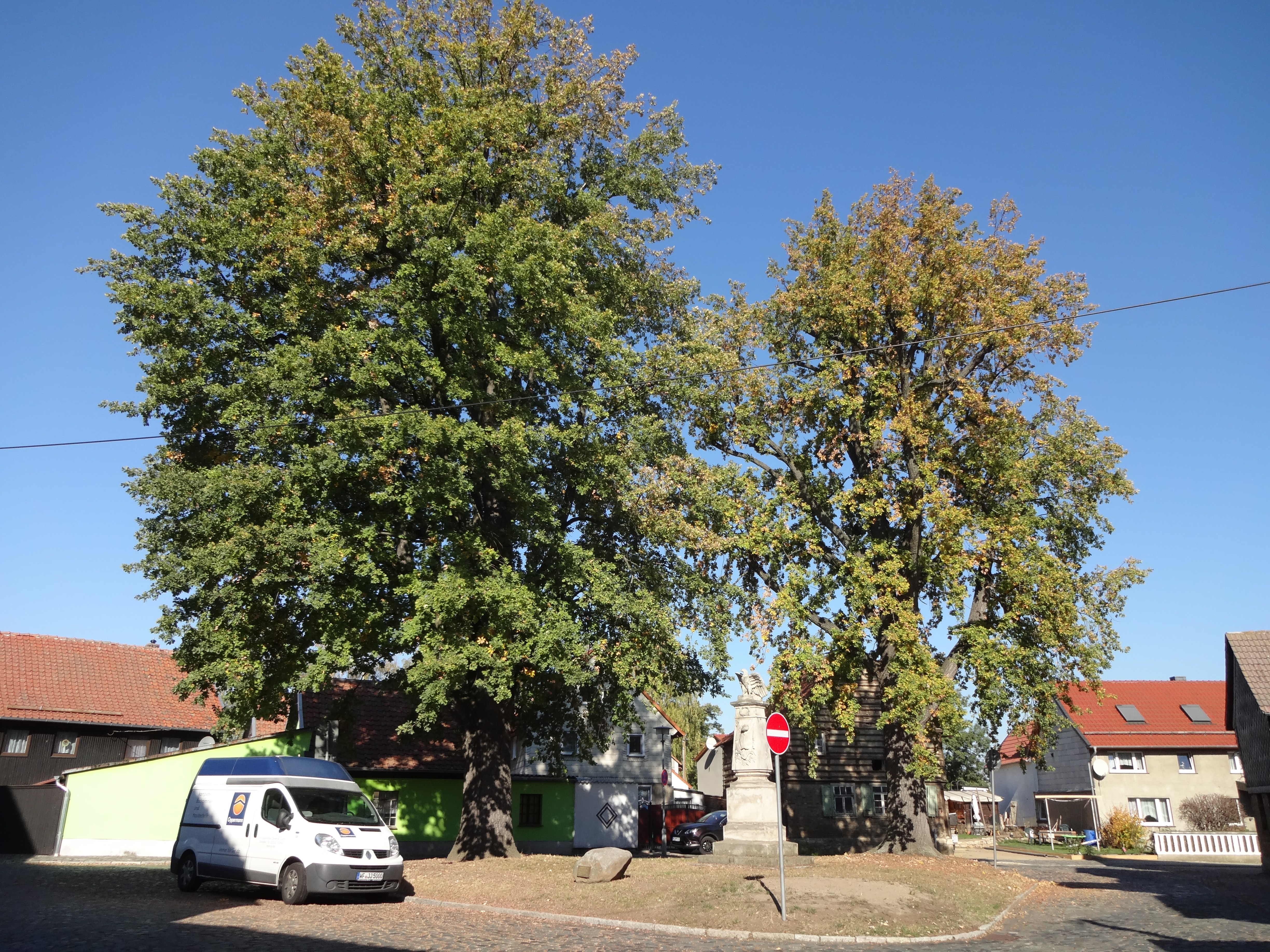 denkmalgeschützter Platz (Hauptstraße/Schienenstraße) in Zilly